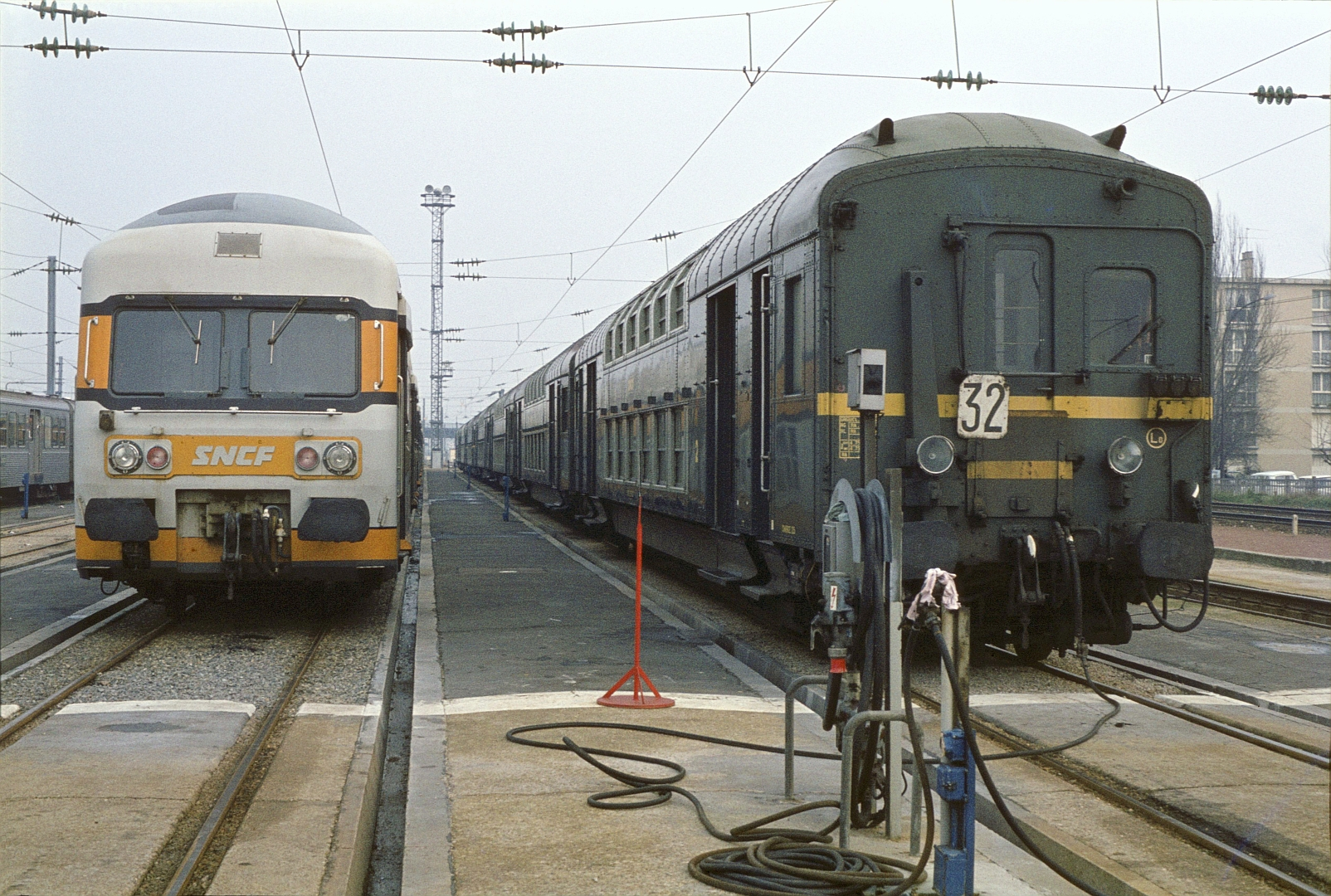 Une rame de voitures à deux niveaux ex-Etat stationne aux garages du Val d’Argenteuil le 23 janvier 1982.